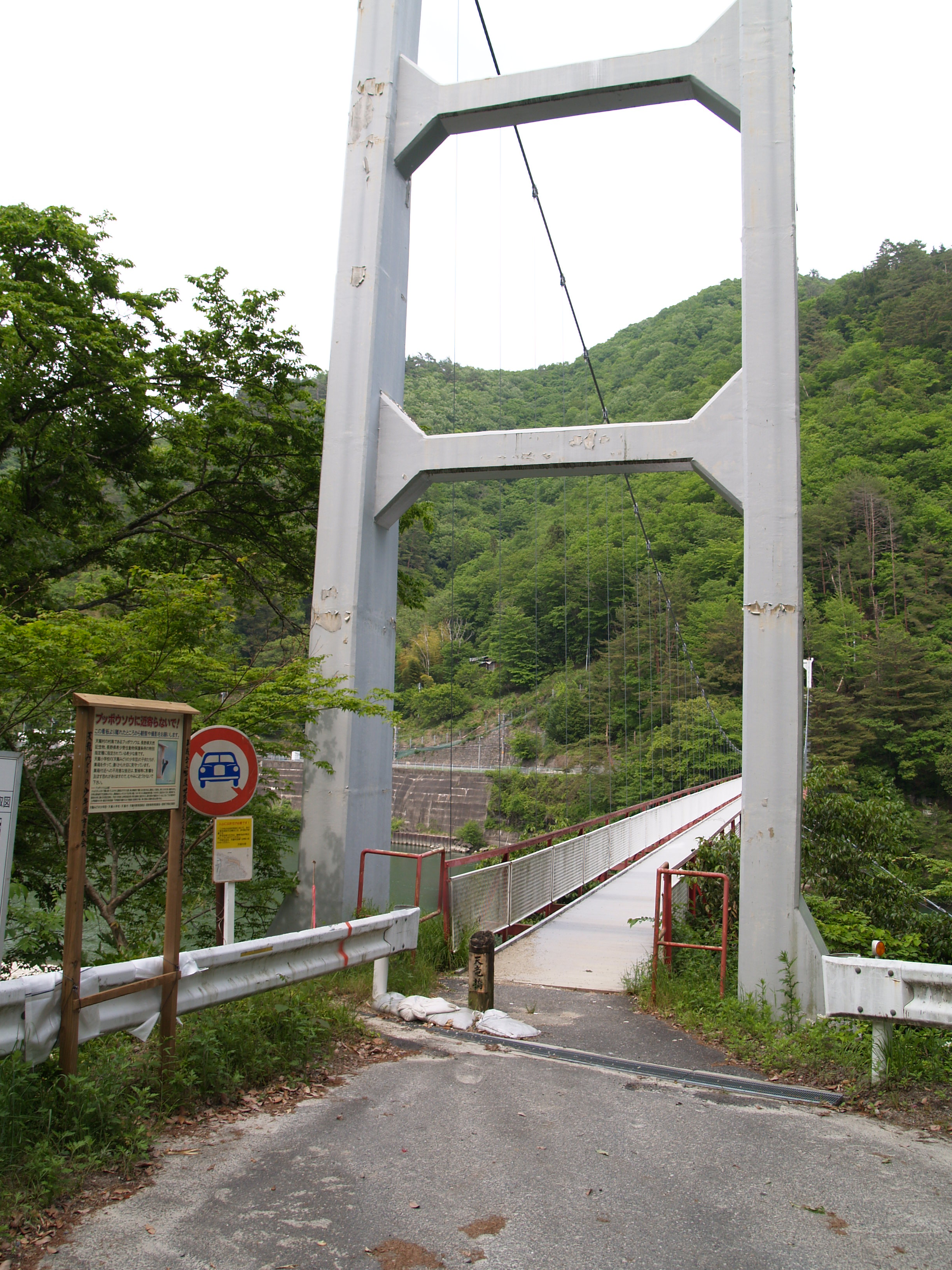 長野県道430号為栗和合線（天竜橋）